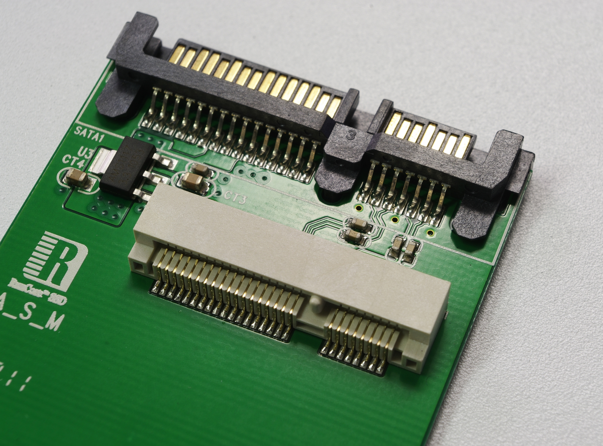 Adapter zur Verbindung einer Mini-SSD mit SATA.